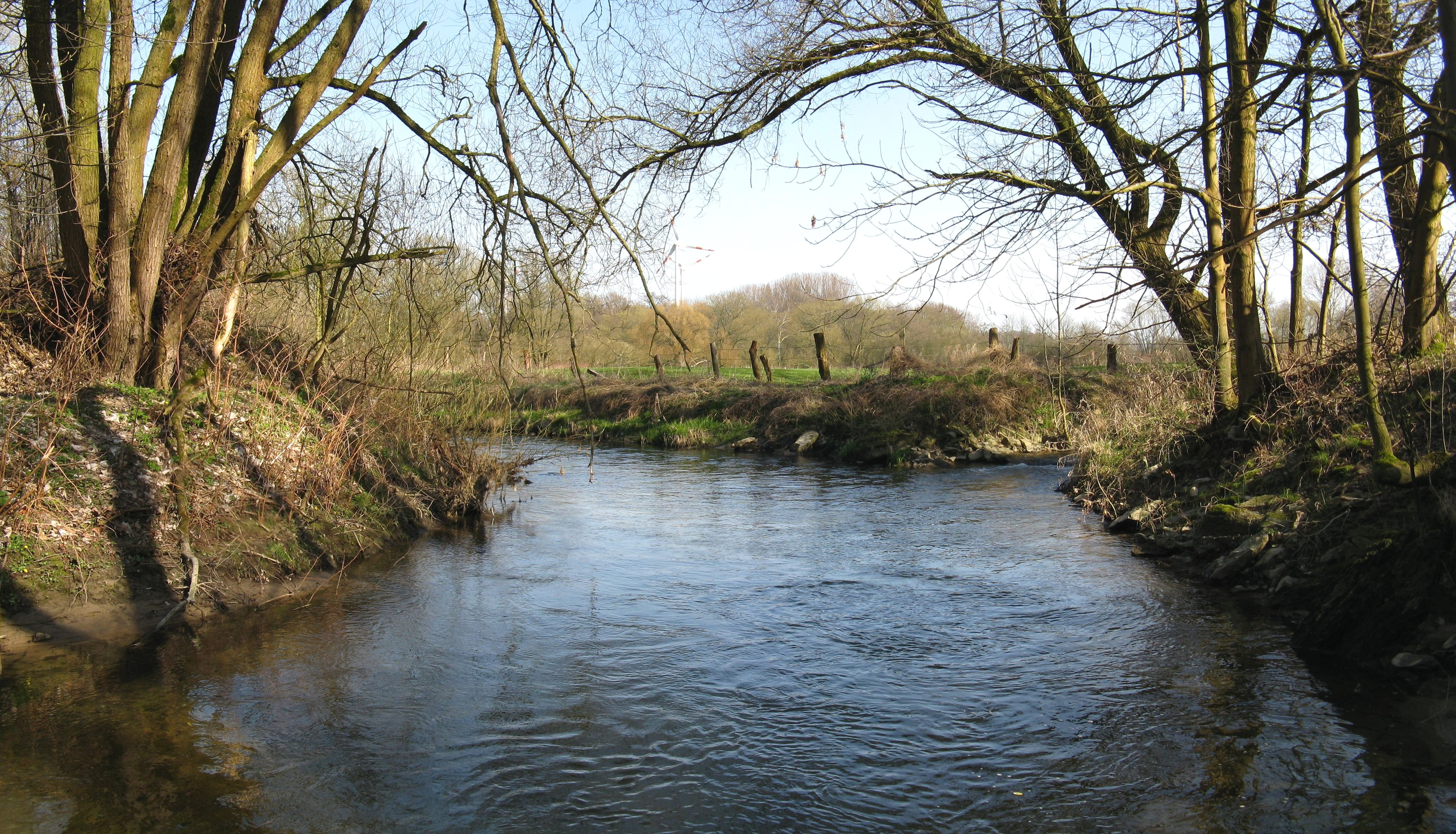 Mündung des Rethlager Baches (von rechts) in die Werre